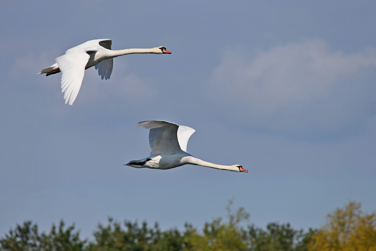 Höckerschwäne in Mecklenburg